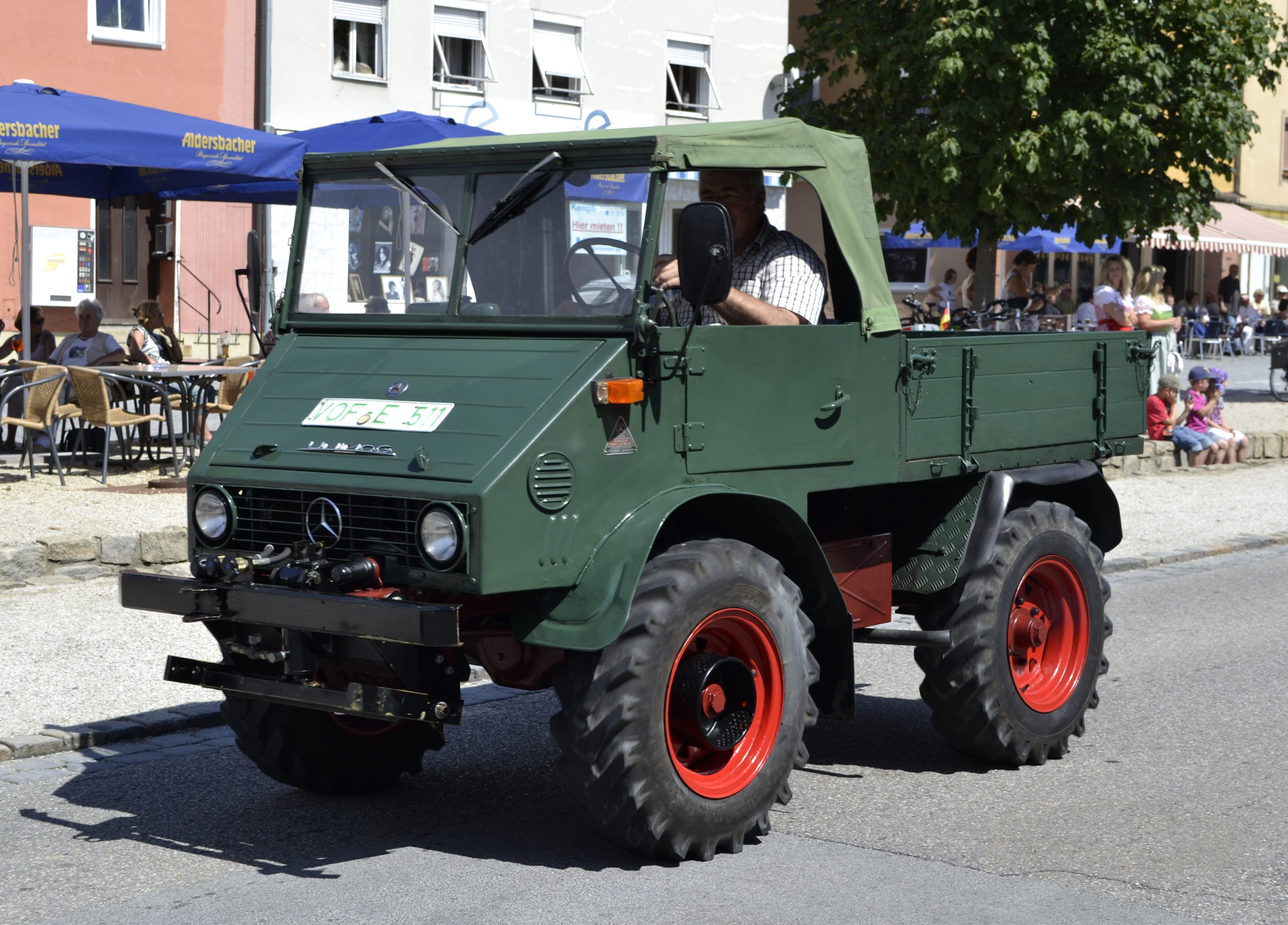 Ein Unimog beim Oldtimerumzug in Aidenbach.